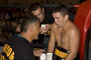 boxing